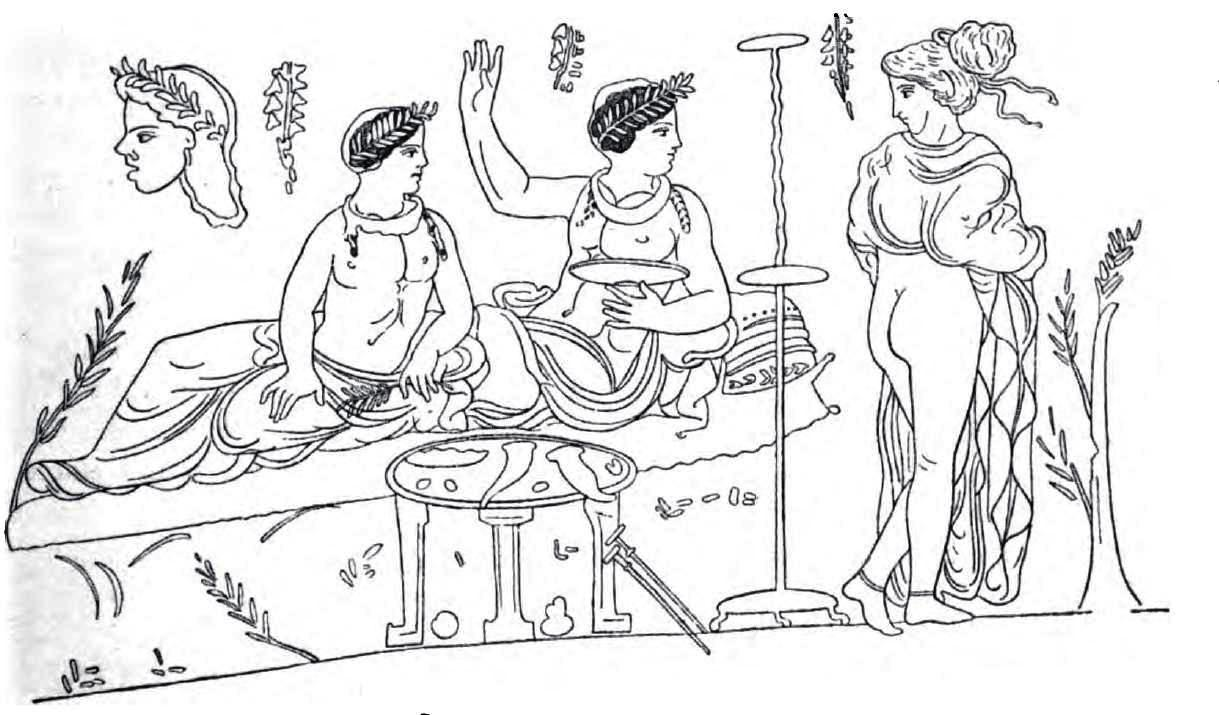 Vasenmalerei aus Unteritalien